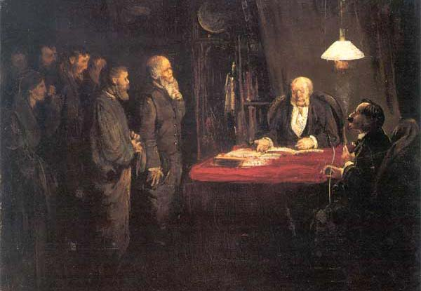 Strike